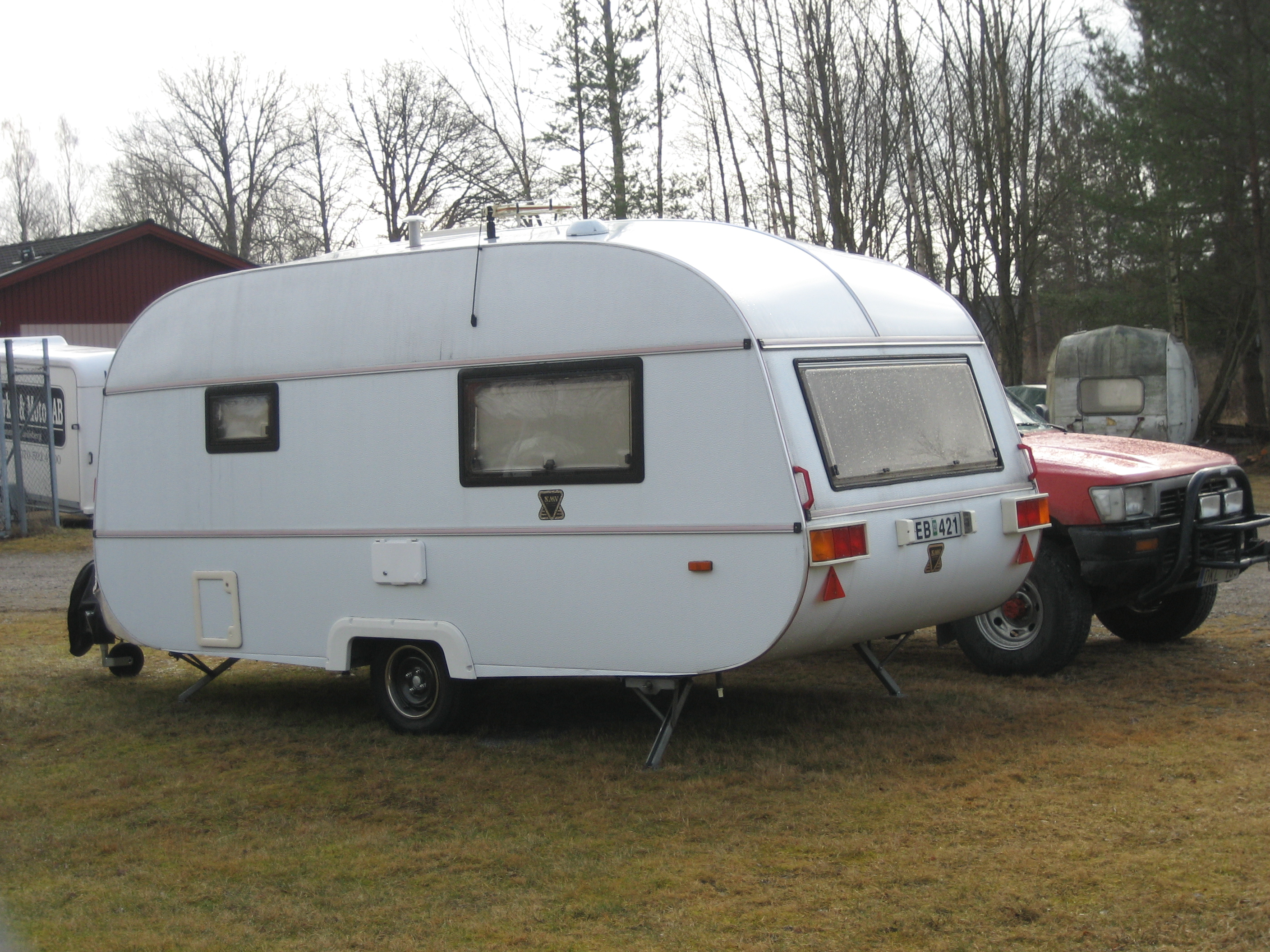 SMV caravan